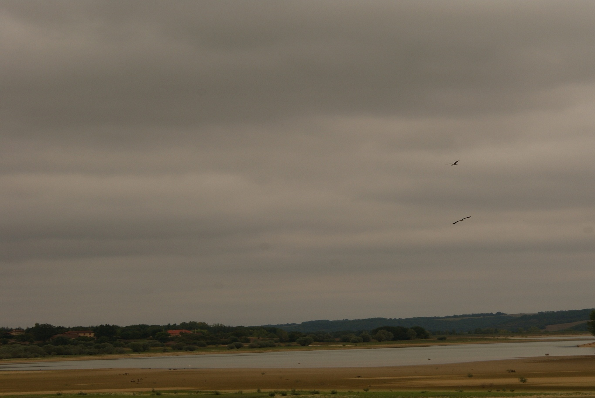 Zicht op de zuidzijde van het Réservoir de L'Astarac.